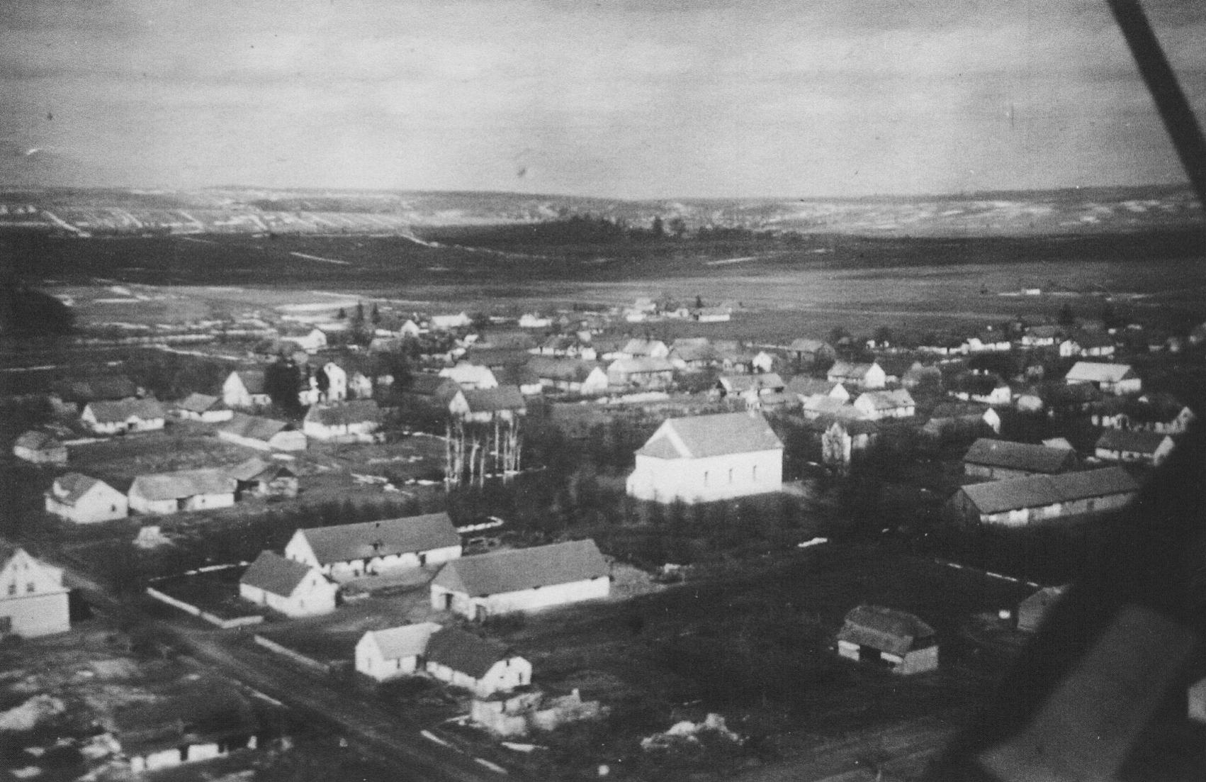 Dornfeld von Südwesten